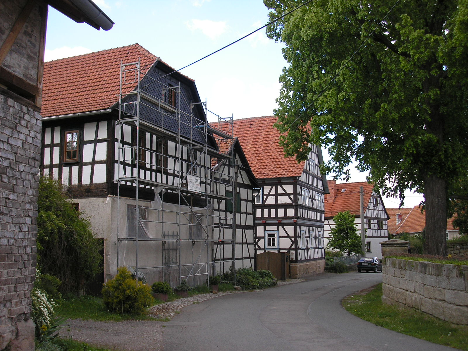 Häuserzeile in Gösselborn (Ilm-Kreis, Thüringen).